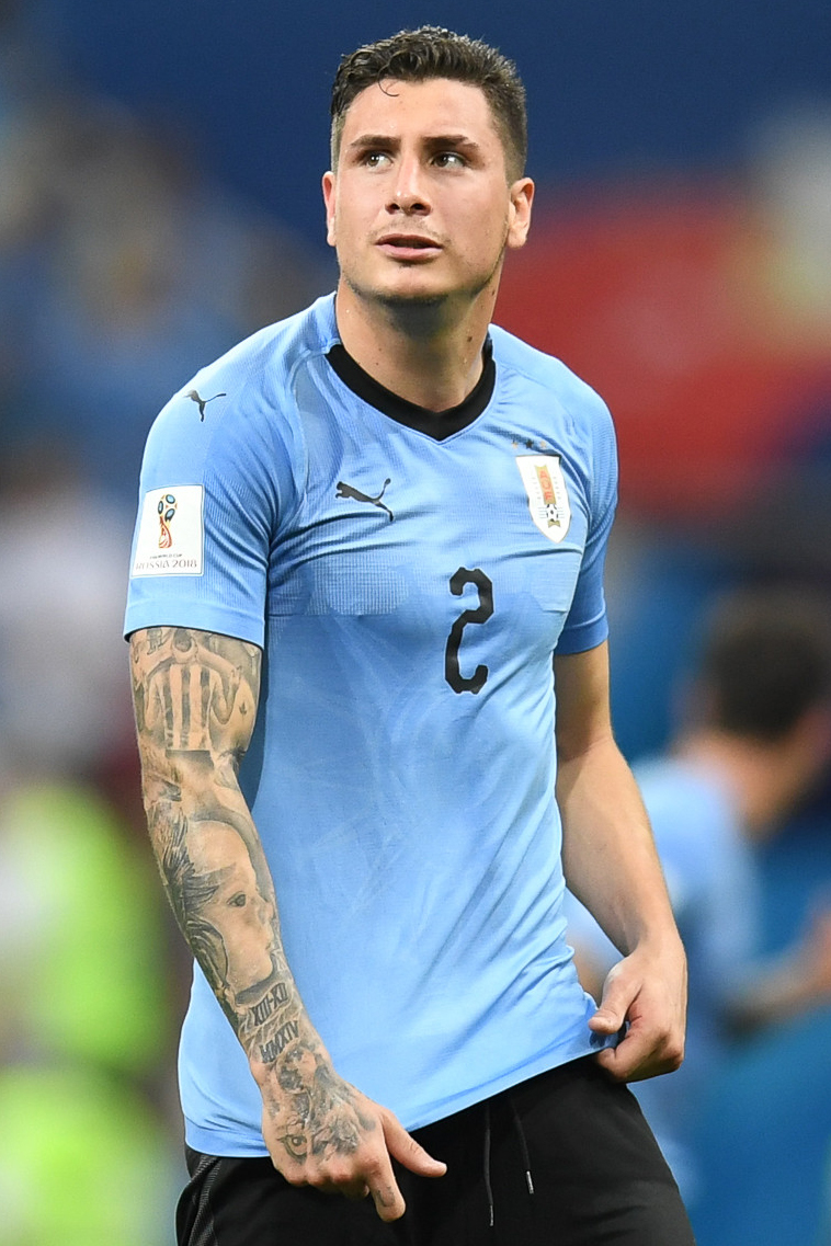 День, когда Роналду попрощался с ЧМ. Кавани и Суарес идут дальше